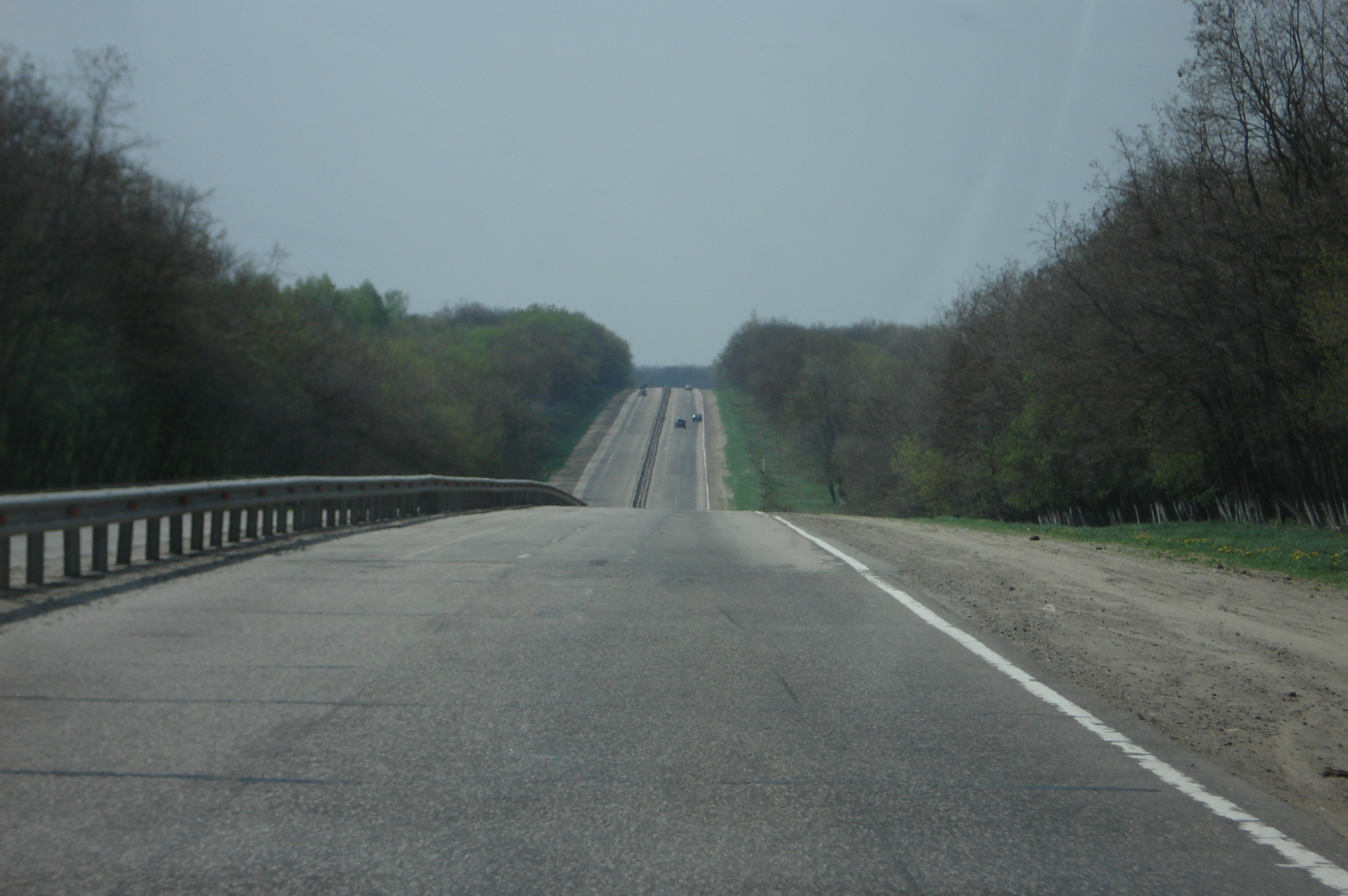 Трасса M2 (E105) в Белгородской области